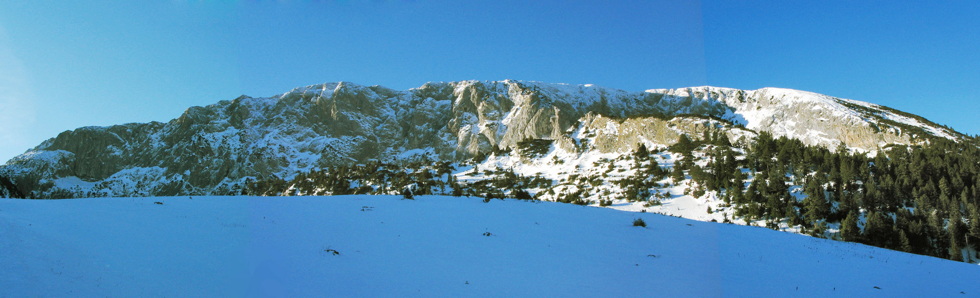 Планина Хајла, фотографисано из мјеста звано Гропе. Аутор фотографије: Дамир Скареп Забранјено користити фотографију без навођенја аутора!